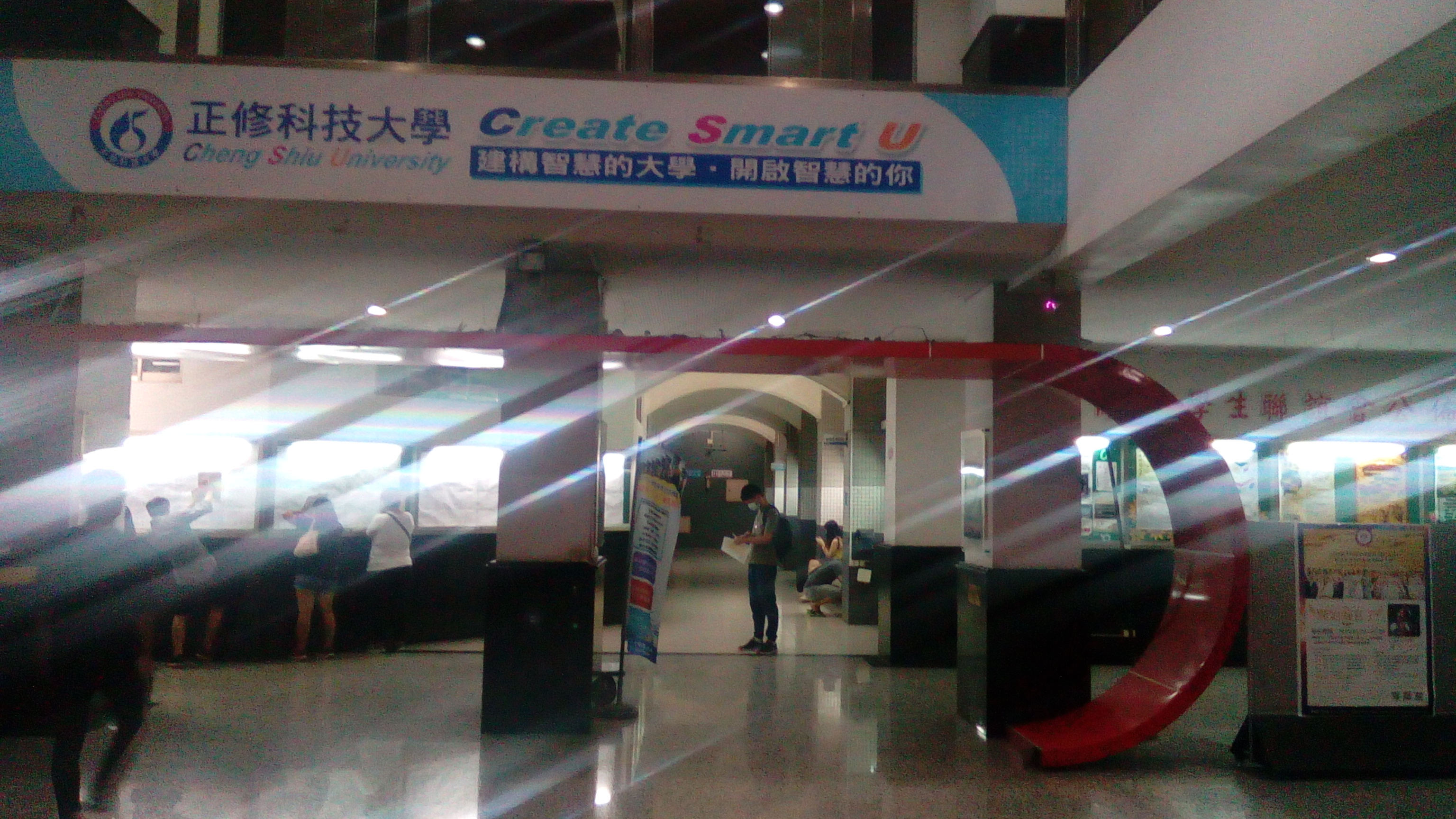 同上